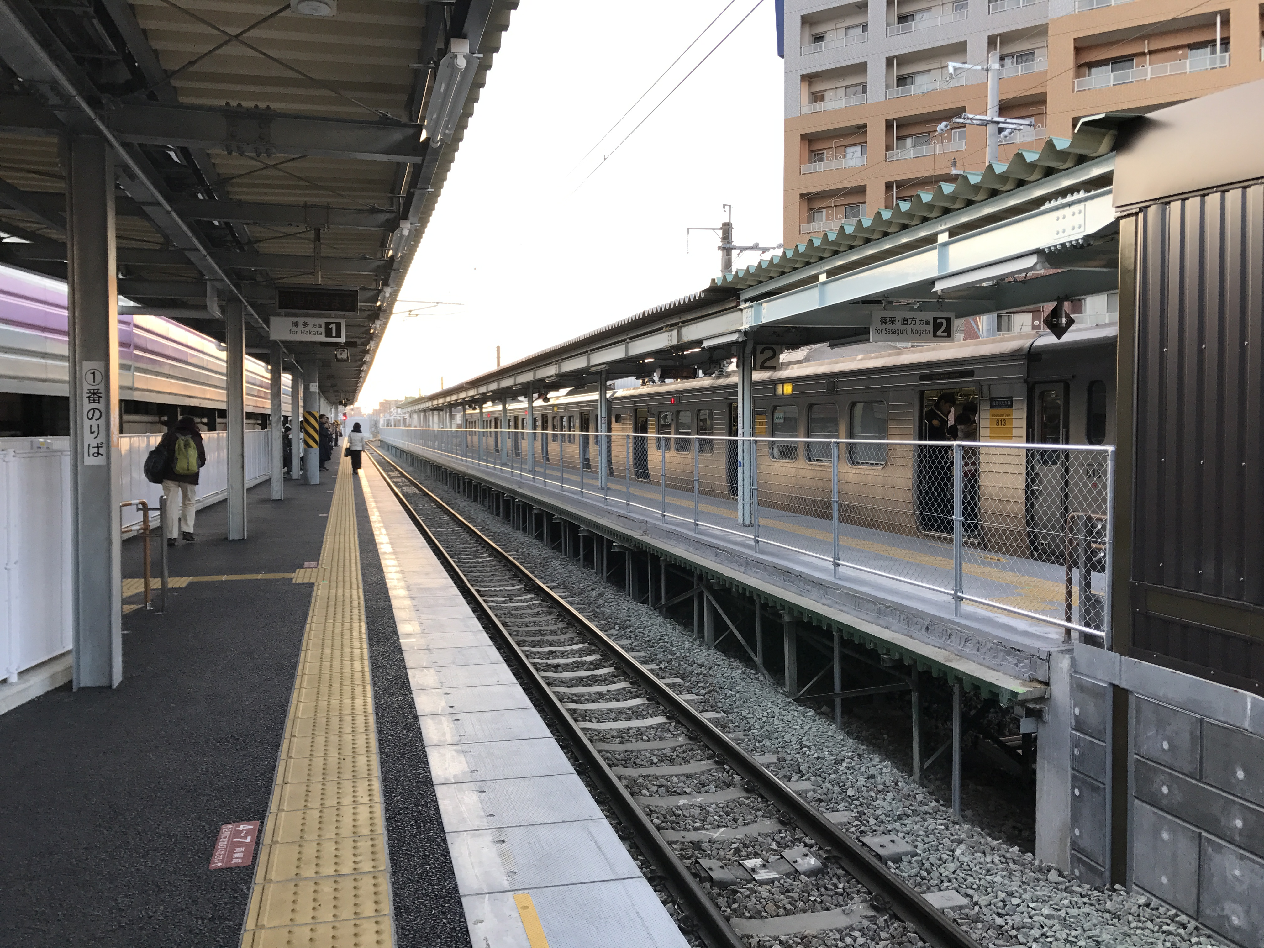 柚須駅のホーム(奥は吉塚方面)